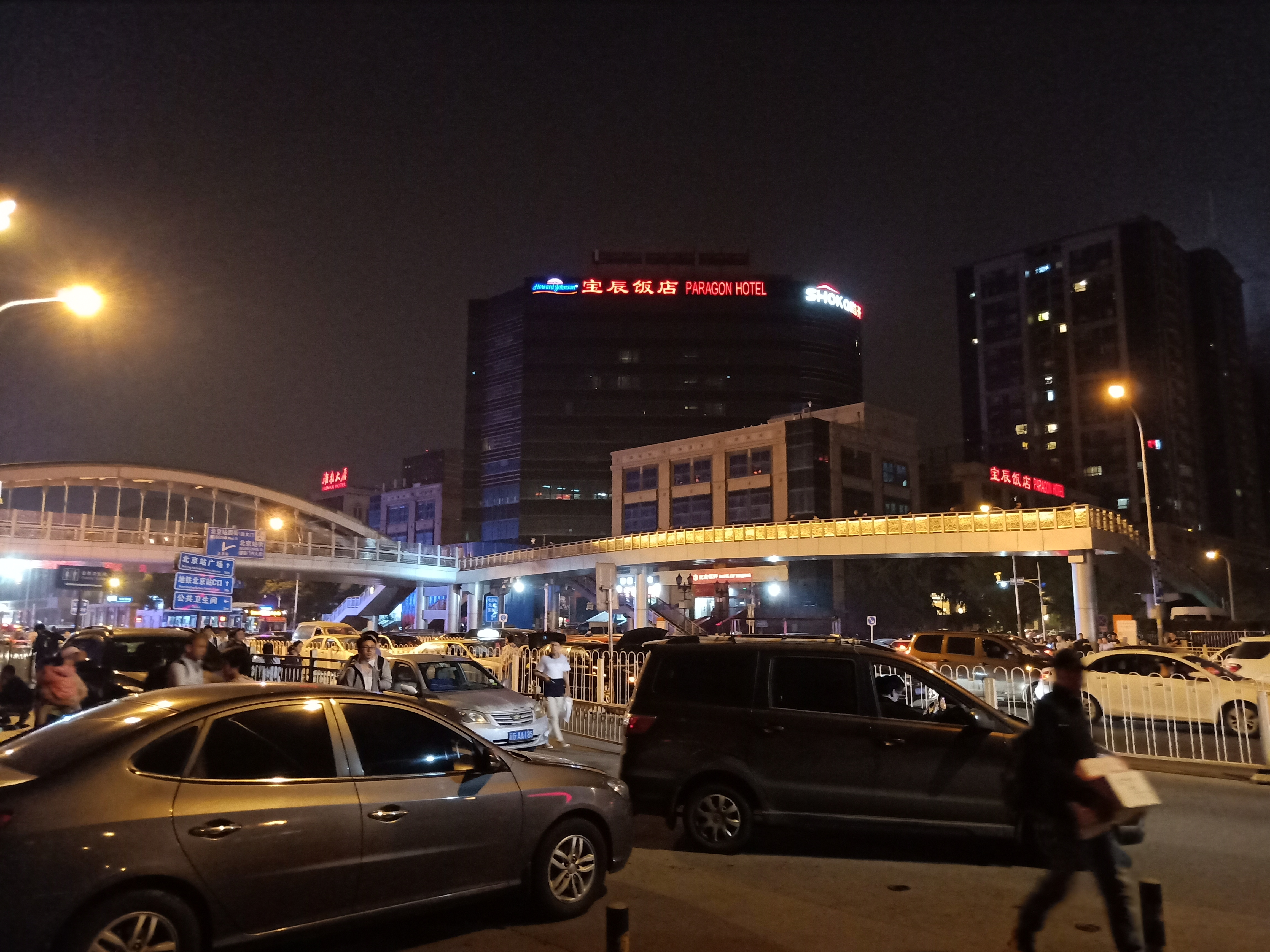 粵語: 北京寶辰飯店